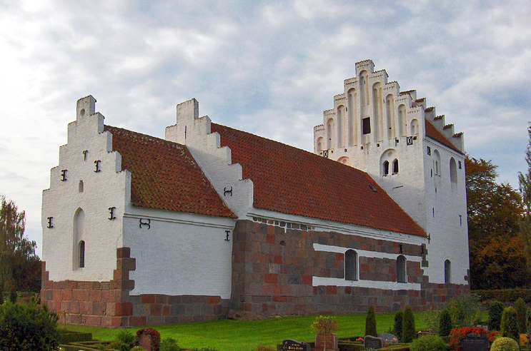 fra nordøst